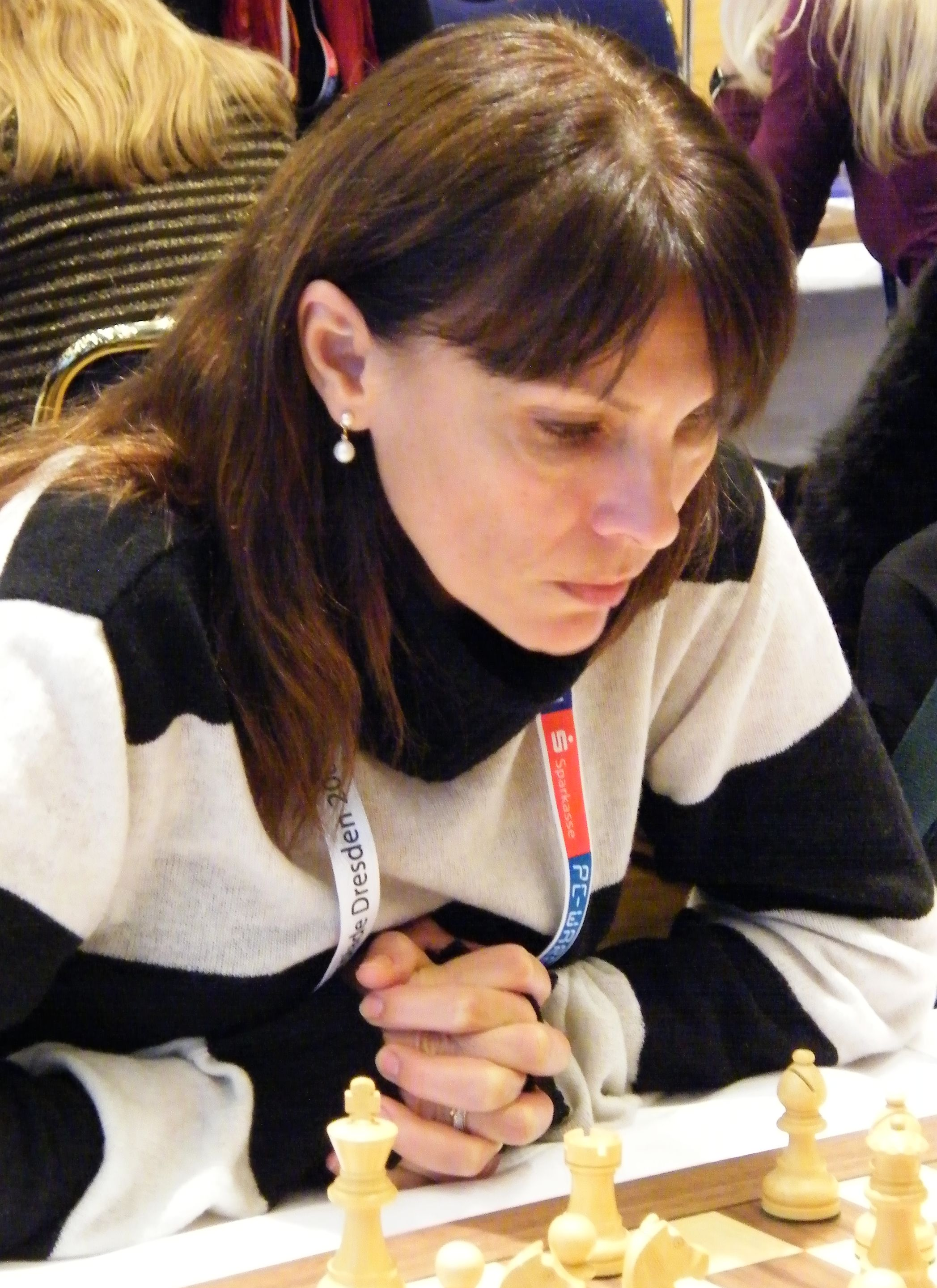 Marina Makropoulou bei der 38. Schacholympiade in Dresden 2008